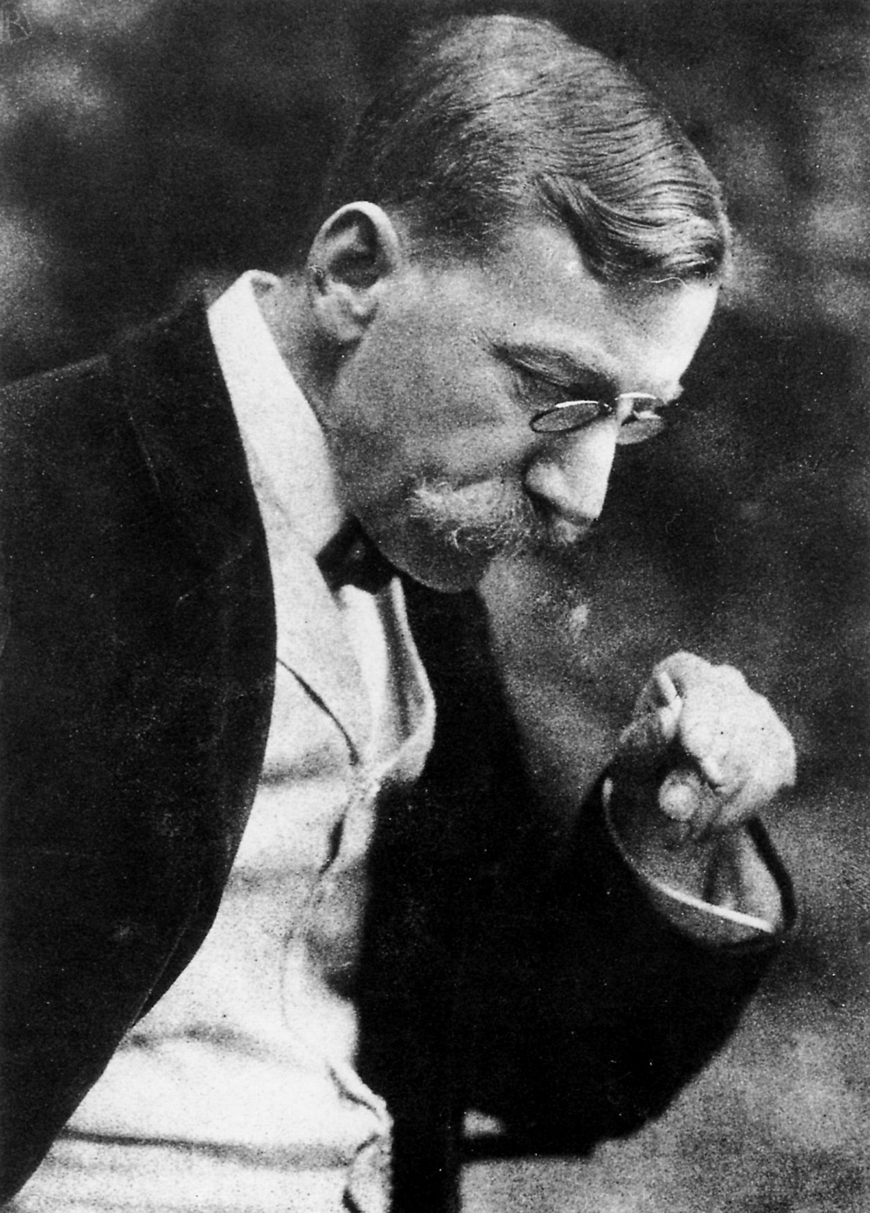 Originale Bildunterschrift: Porträt des Arztes und Amateurphotographen Dr. G. Eduard Arning, Hamburg